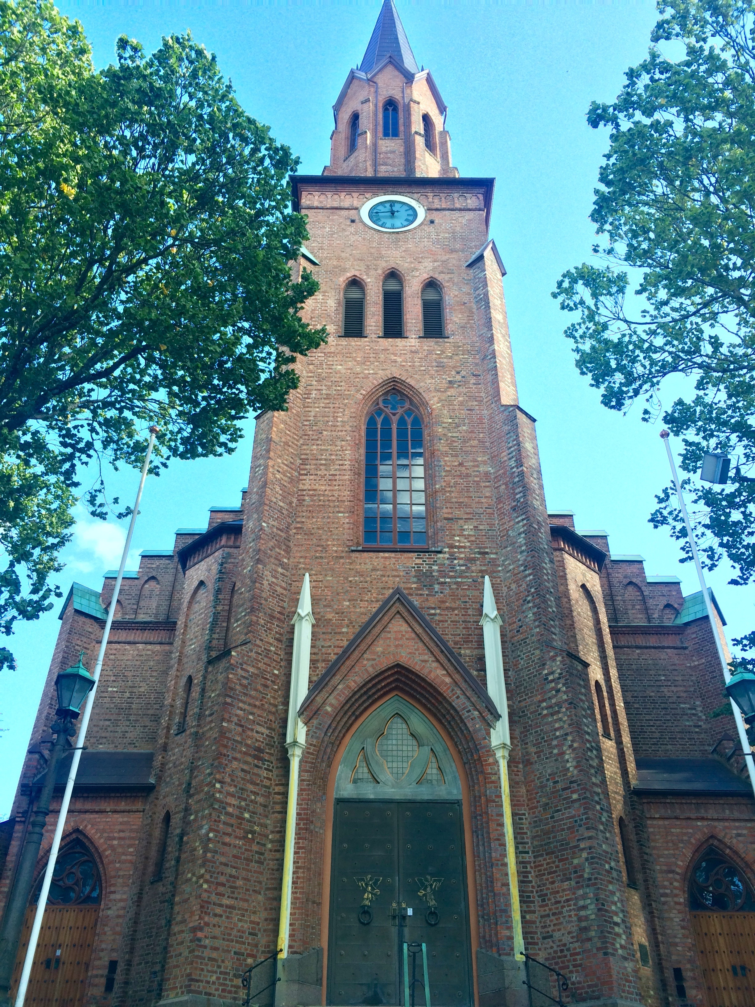 Tønsberg domkirke, Tunsberg bispedømme, Tønsberg, Vestfold. 25. september 2015.